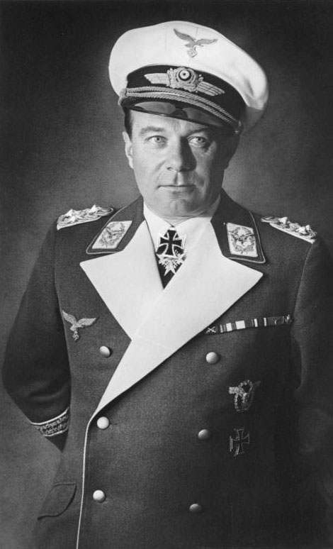 Porträt Ernst UdetsAbgeschnittene Beschriftungen: unterer Bildrand links: Foto Conrad, rechts: Generaloberst UDE[T] weißer Streifen rechts: Bundesarchiv, Bild 146-1984-112-13 / Foto: Conrad | 1940/1941 ca.